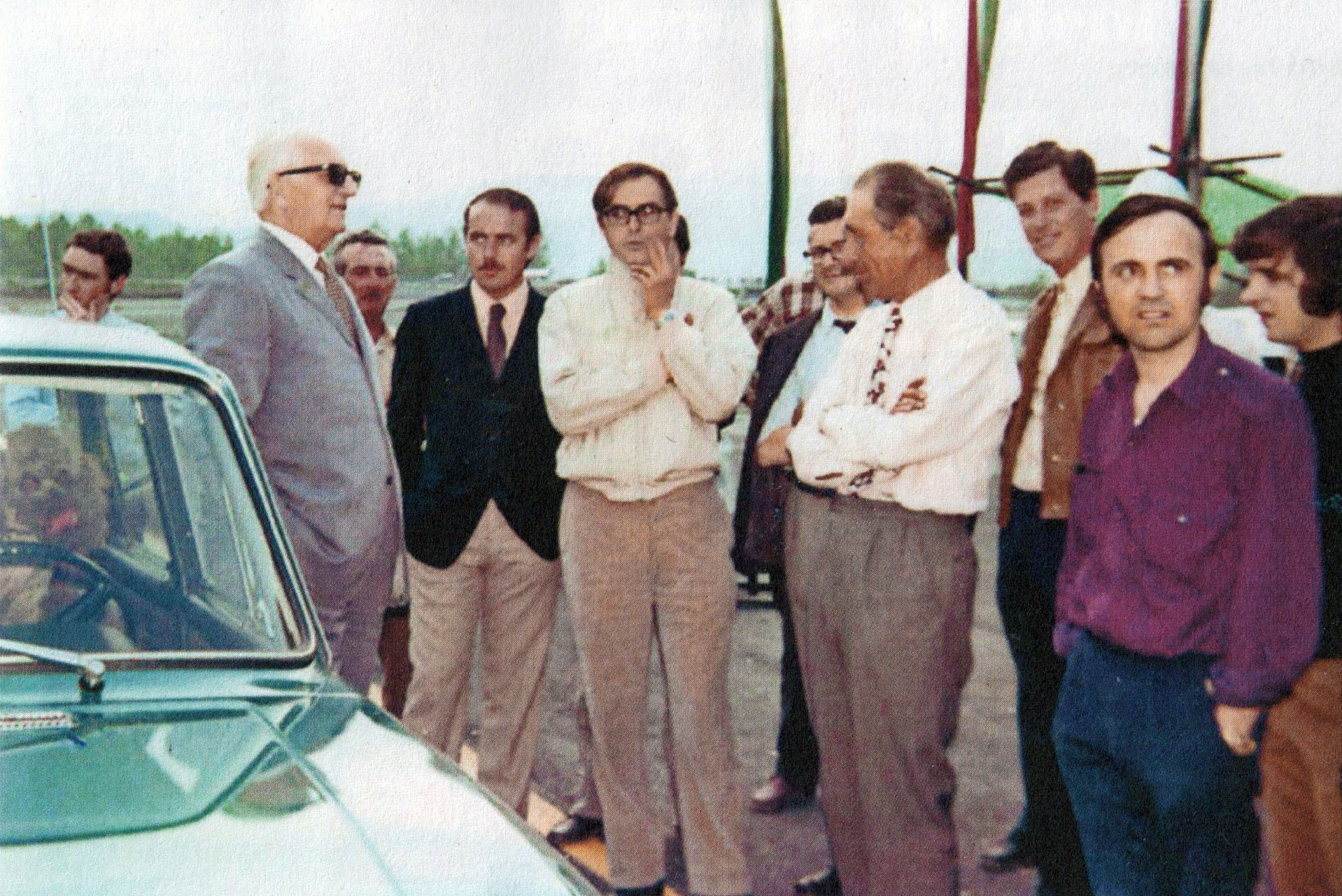 L'ex pilota automobilistico e costruttore italiano Enzo Ferrari (a sinistra), e l'ingegnere e costruttore italiano Gian Paolo Dallara (al centro), a colloquio sul circuito di Varano de' Melegari; a fianco di Dallara, a braccia conserte, il padre di quest'ultimo.